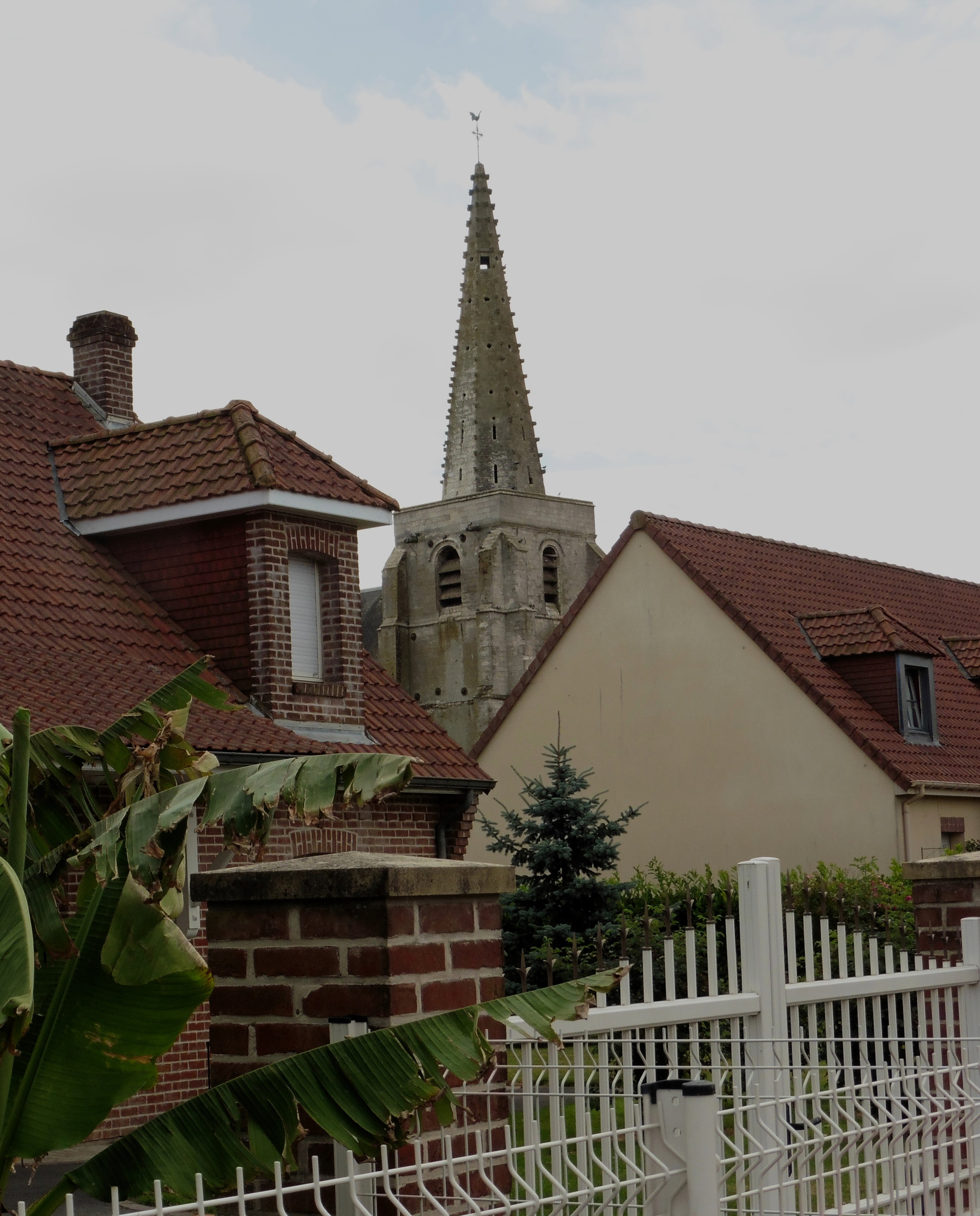 Le clocher de l'église Saint-Martin vu de la Rue de Bouvigny à Servins dans le Pas-de-Calais Nord-Pas-de-Calais.- France.